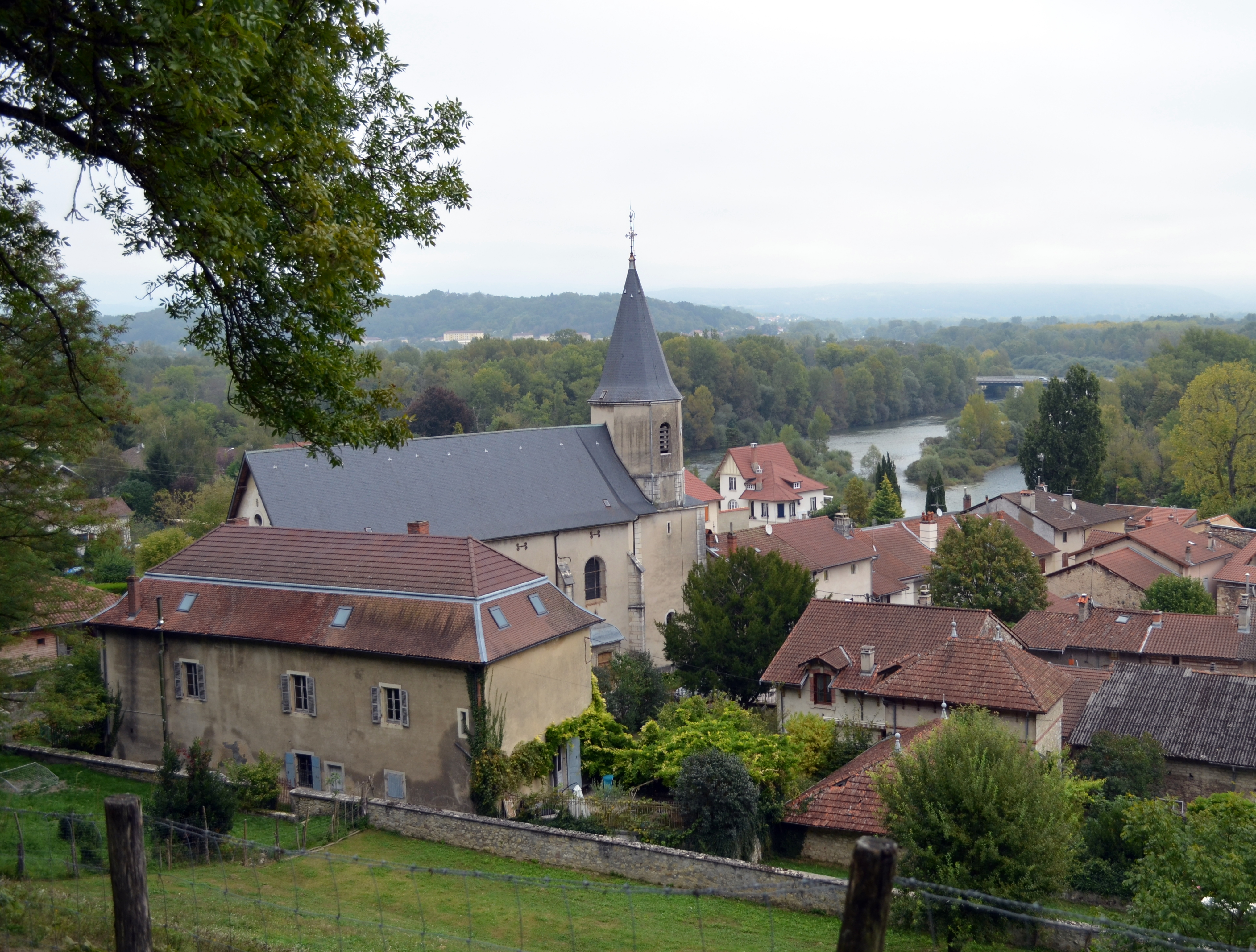 Église Sainte-Madeleine de Varambon. .